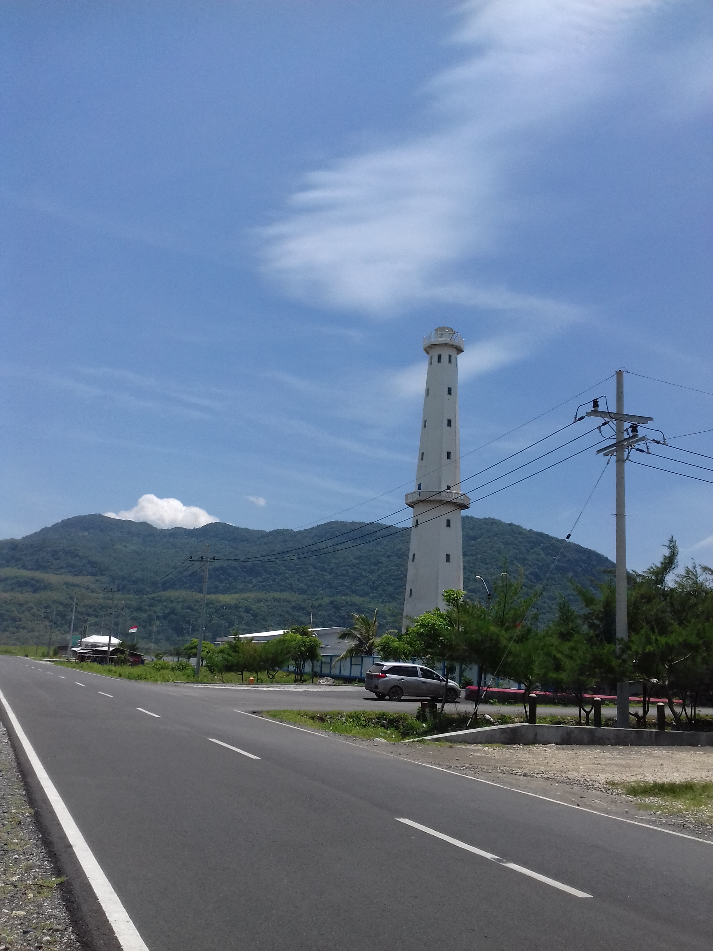 Menara Suar Bukit Watangan berdiri di tepi Jalan Lintas Selatan Jawa, ruas Jarit- Puger